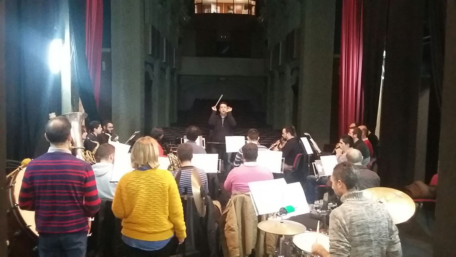 Ensayo de la Banda Municipal de Música de Jerez